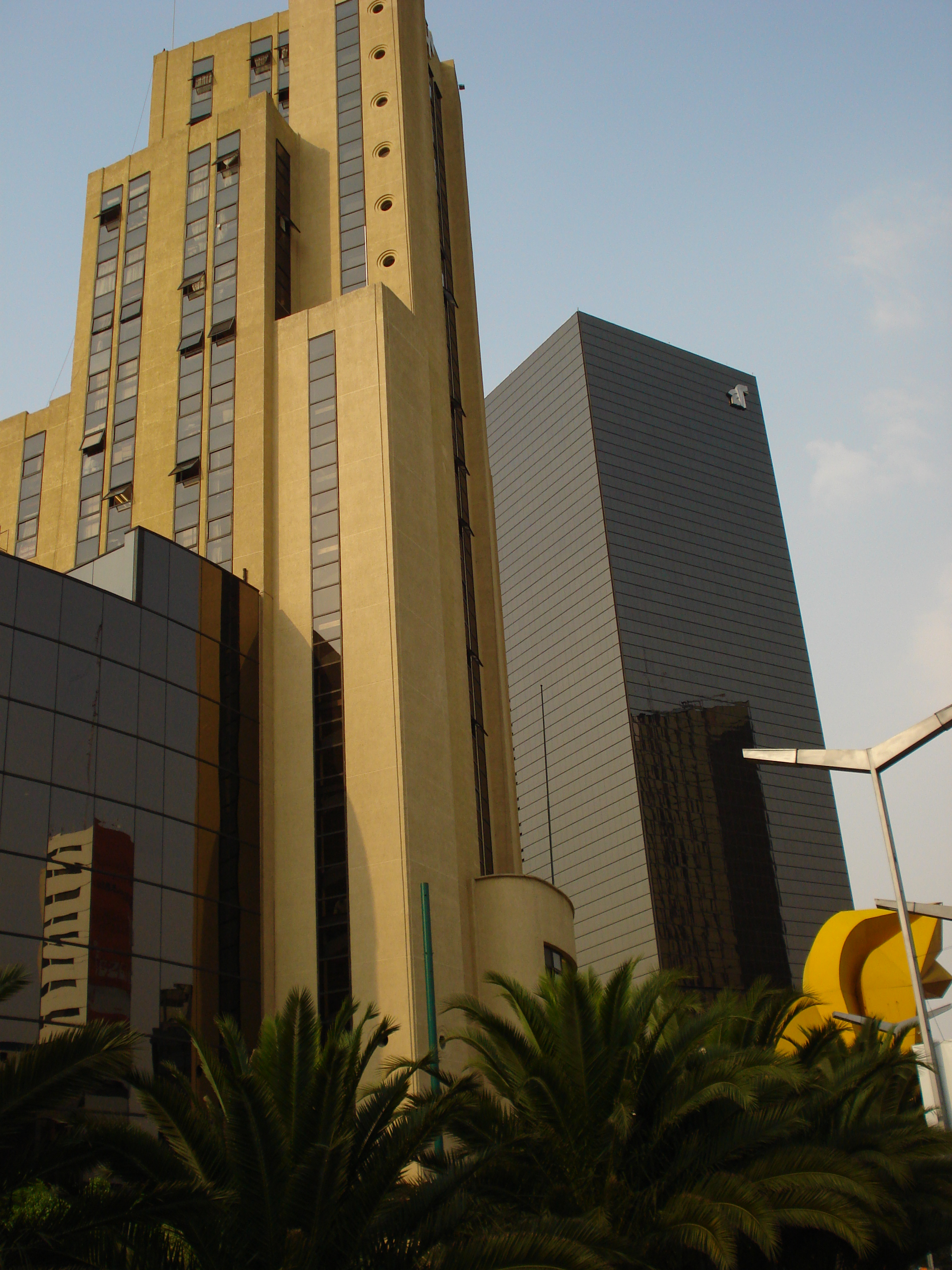 Edificio el Moro sede de la Lotería Nacional de México a la derecha la Torre del Caballito, Paseo de la Reforma en la Ciudad de México.